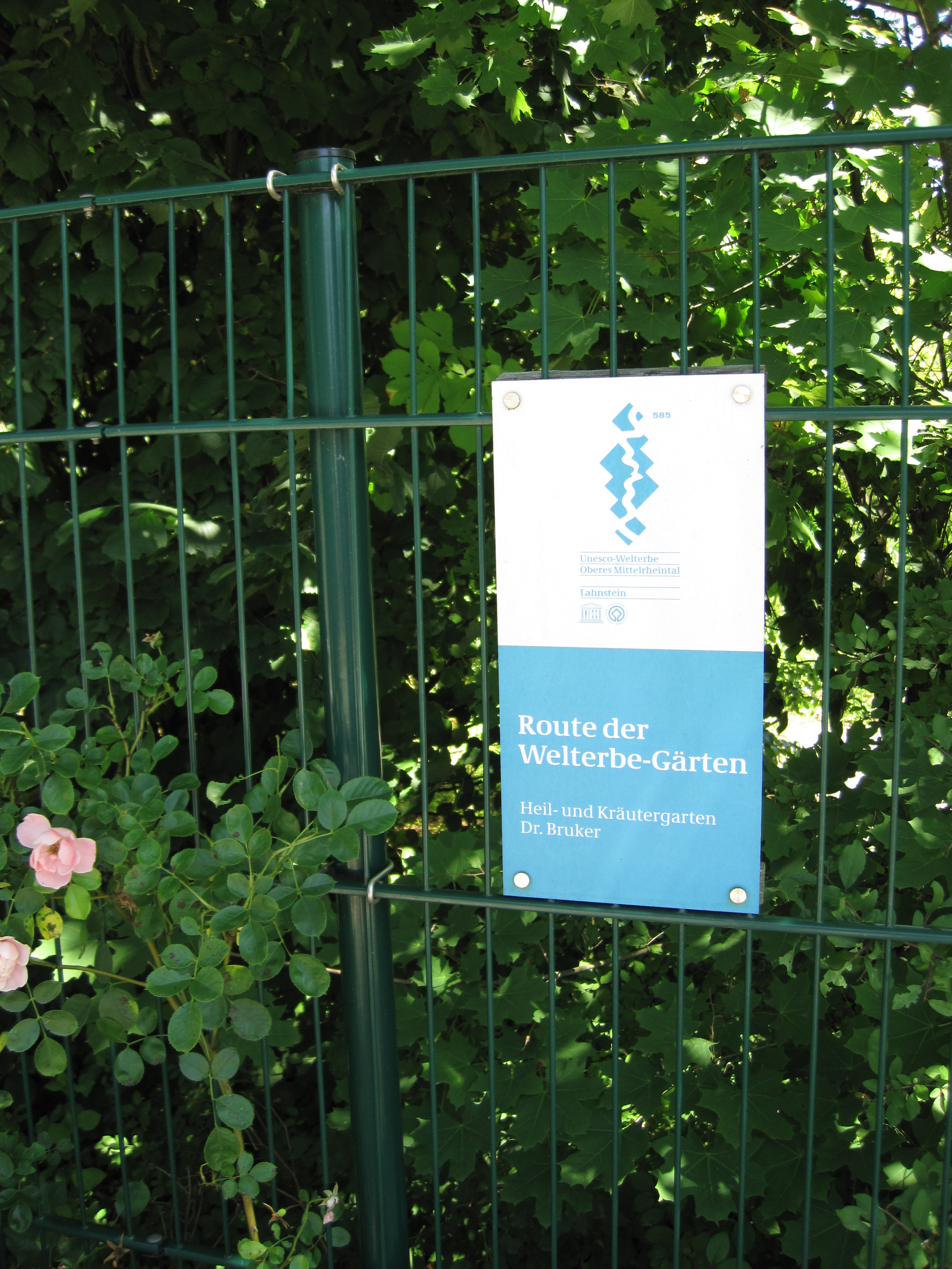 Dr.-Max-Otto-Bruker-Garten, Lahnstein auf der Höhe. Teil der Route der Welterbegärten.